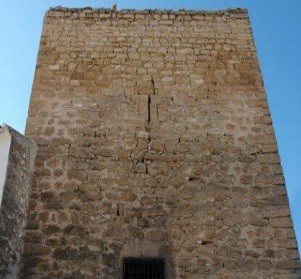 bbbbbbb